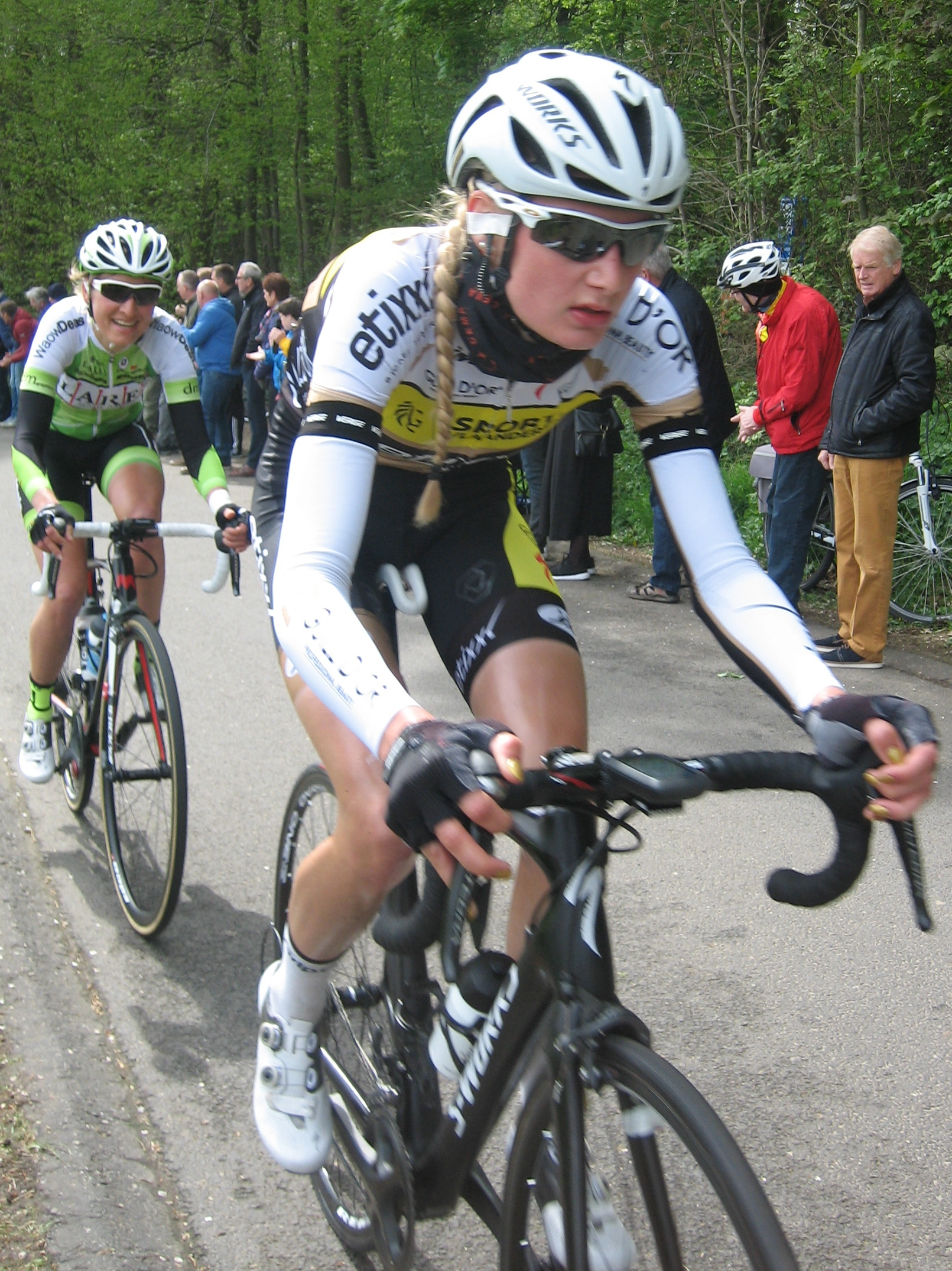 Na 45km, beklimming van de Eyserbosweg, in de Amstel Gold Race Ladies Edition 2017.